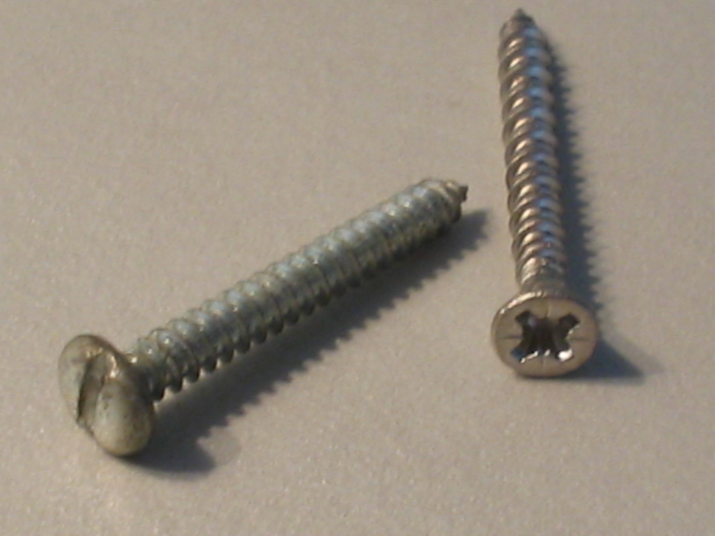 twee schroeven